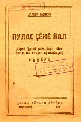 Чӑвашла: Пулас ҫӗнӗ ял. 1930 ҫул. Кӗнеке хуплашки.